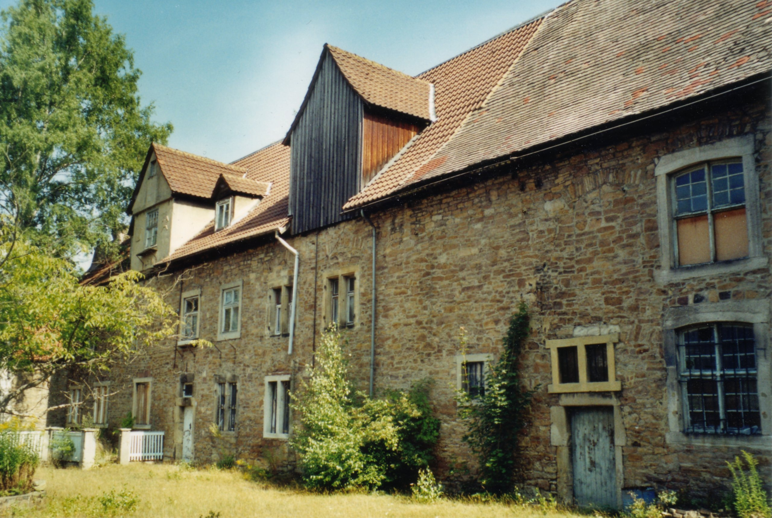 Bildbeschreibung: Messinghof (Kassel) - Gießereiflügel Quelle: privat Fotograf/Zeichner: Albert Gronau, Kassel Datum: Juli/August 2003 Sonstiges: Mit freundlicher Genehmigung A. Gronau (siehe hier)